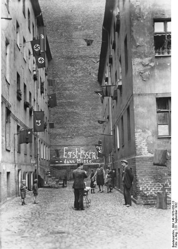 Mieterstreik im Jahre 1932 in Berlin Die Mieter des Hauses Köpenickerstr. 34/35 sind aus Protest gegen die zu hohen Mieten und den verwahrlosten Zustand des Hauses in den Streik getreten. Sie führen ihn unter der Parole "Erst das Essen, dann die Miete". Blick auf den Hof des Hauses Köpenickerstr. 34/35. Die Streikparole ist auf die Hauswand gemalt. Die Mieter haben zum Teil kommunistische und zum Teil Hakenkreuzfahnen ausgehängt. 23.9.1932